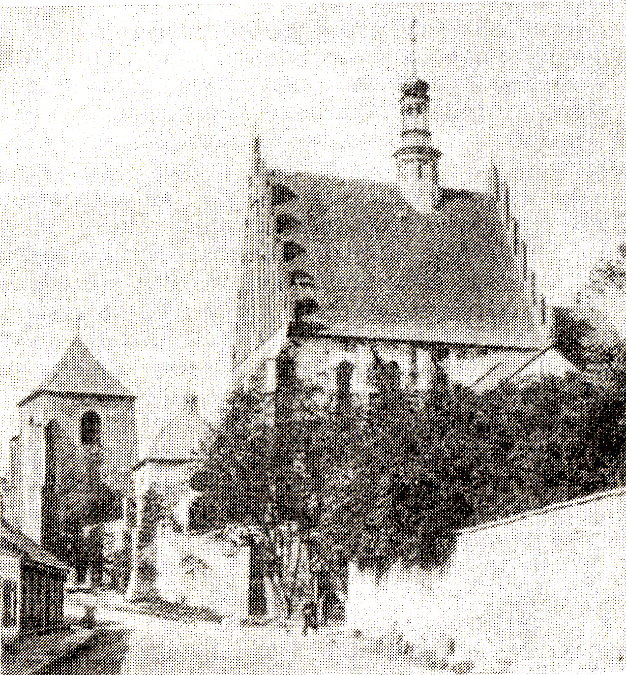 Zdjęcie kościoła św. Zygmunta w Szydłowcu wykonane w 1912 r.